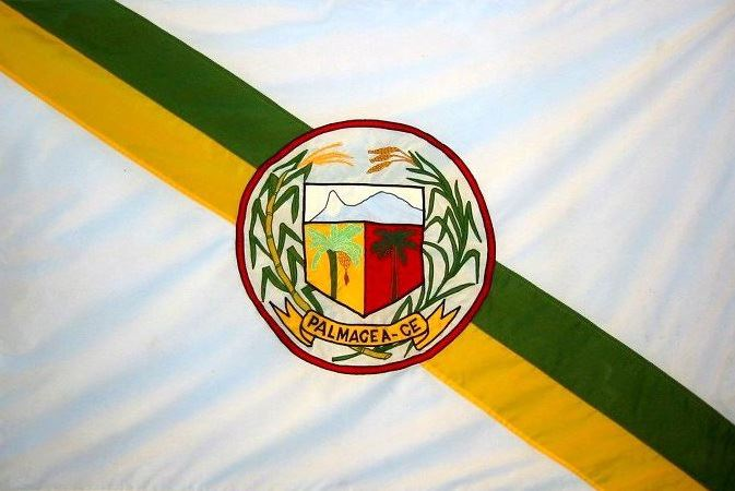 Bandeira do Município de Palmácia